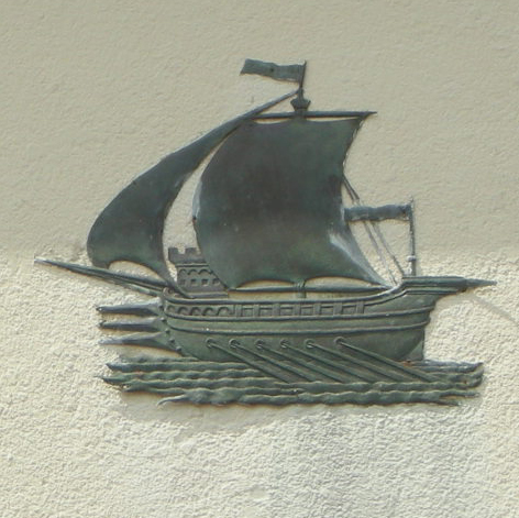 Stabilimento principe di piemonte, veliero decorativo